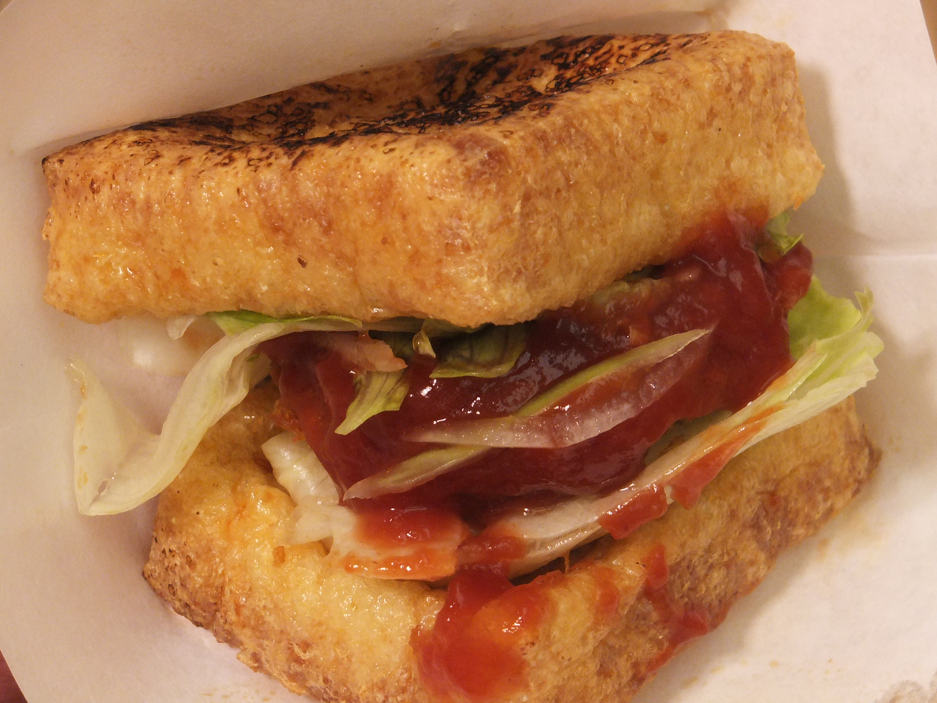 豊川市のご当地グルメ「おきつねバーガー」。通常のハンバーガーと異なり、バンズの代わりに油揚げを使用。